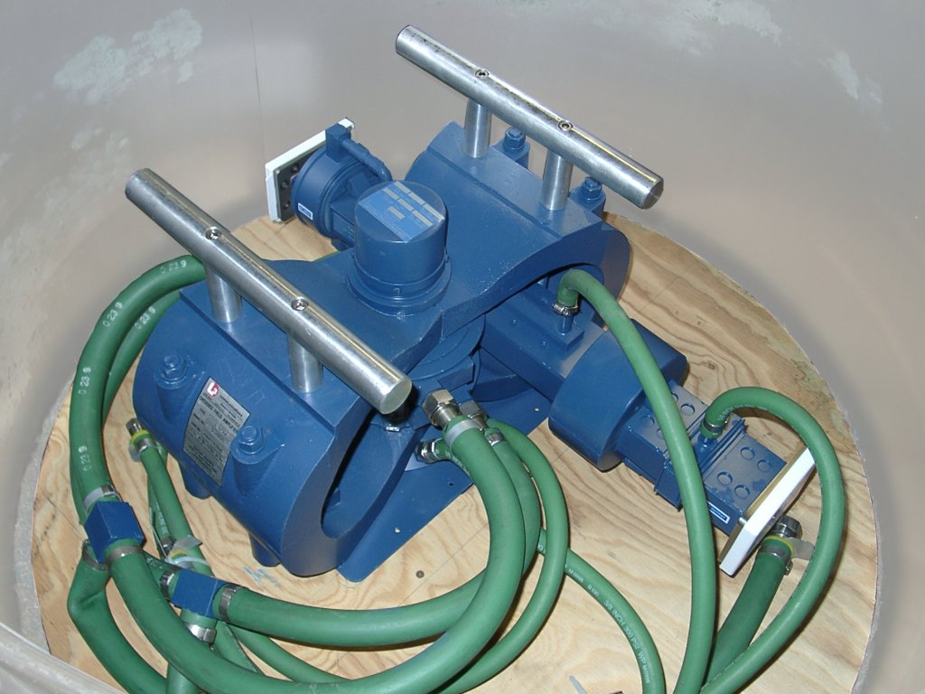 ein wassergekühlter Kreuzfeldverstärker (CFA) in Transportlage